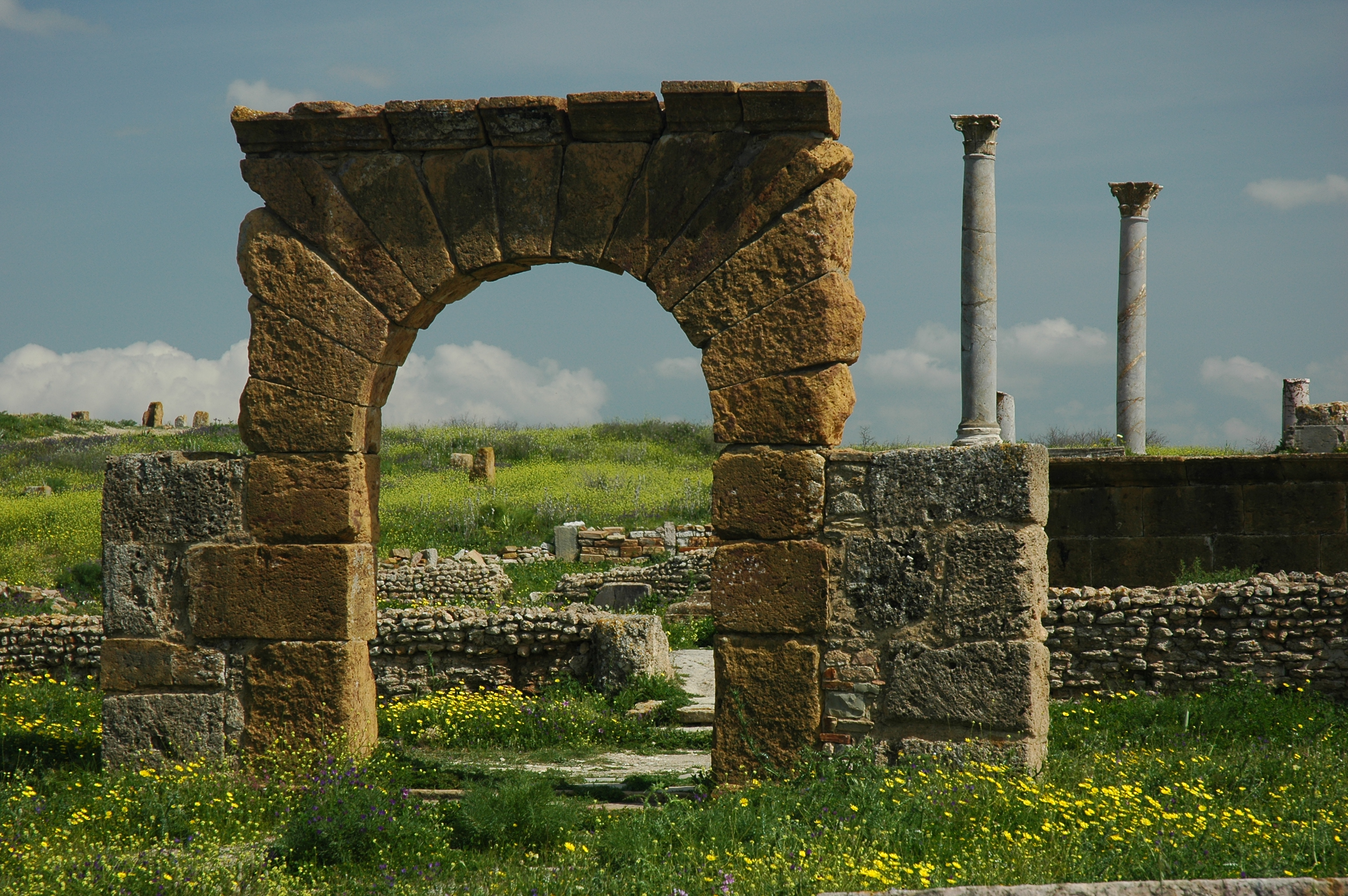 Thuburbo Majus en Tunisie. Temple de Junon Caelestis